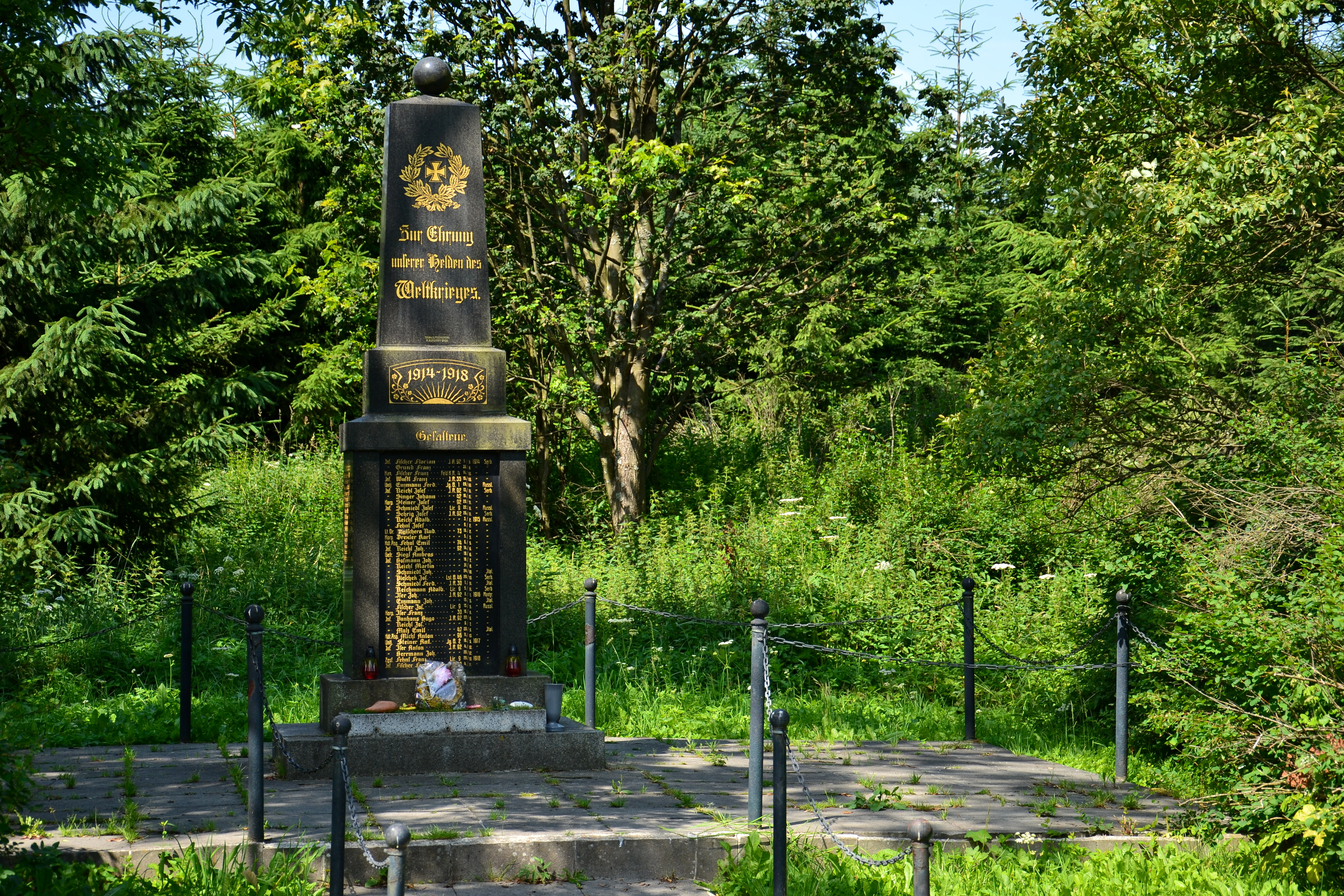 Pomník padlým v první světové válce v Dolině